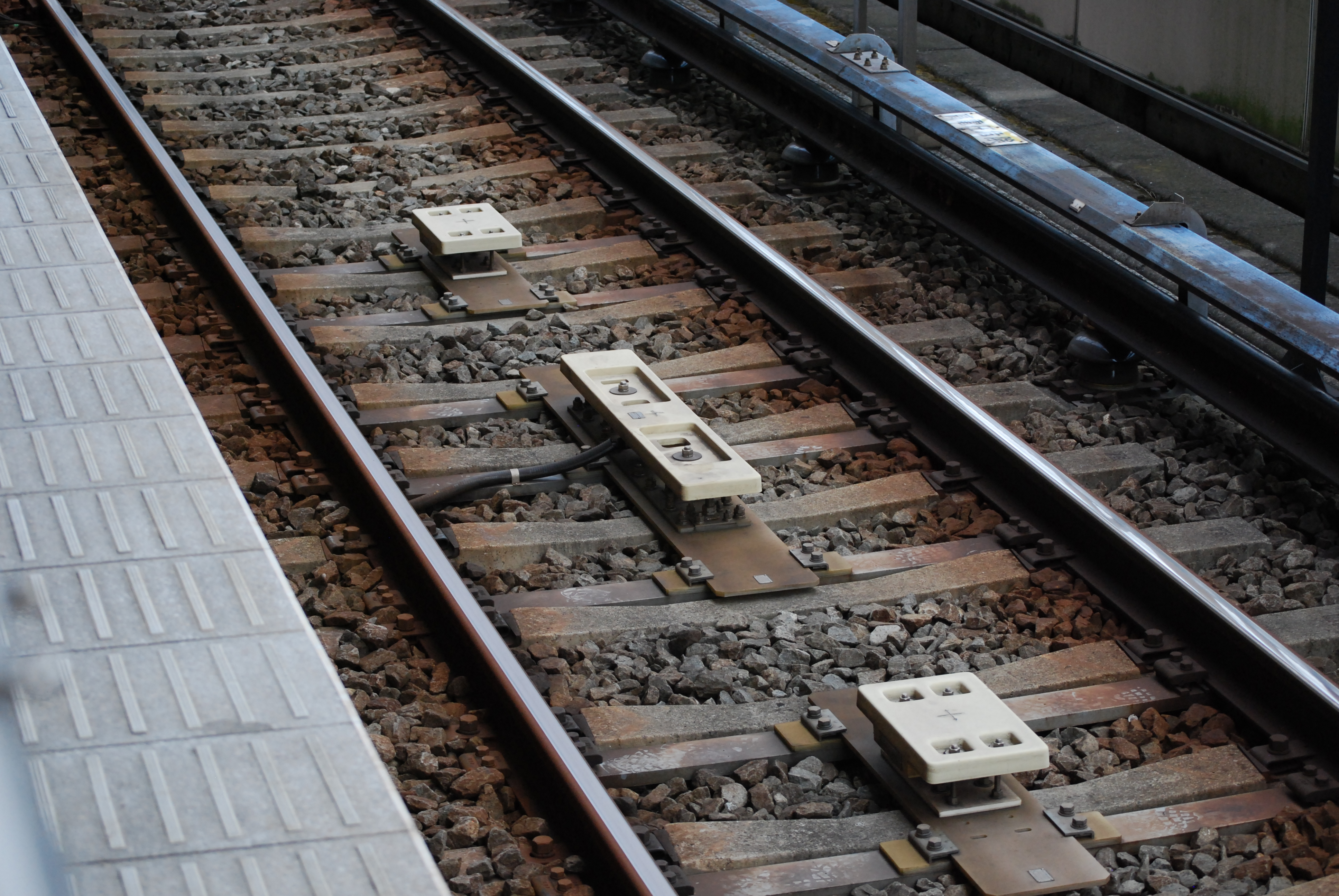 横浜市営地下鉄線ブルーラインのATO地上子（新羽駅ホームから撮影）